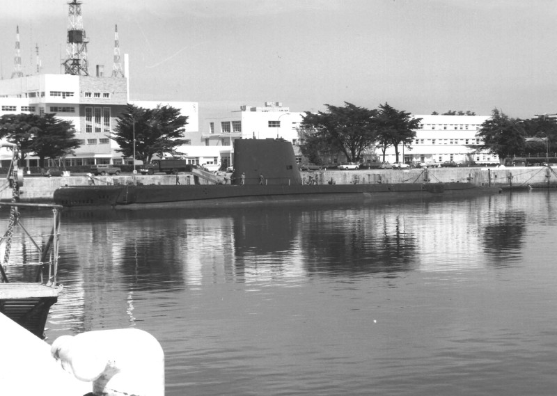 Submarine GUPPY 1 A class, ARA Santiago del Estero (S-22) in BNMP